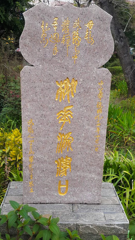 中文（台灣）: 位於桃園市立武陵高中的桃花源渡口碣